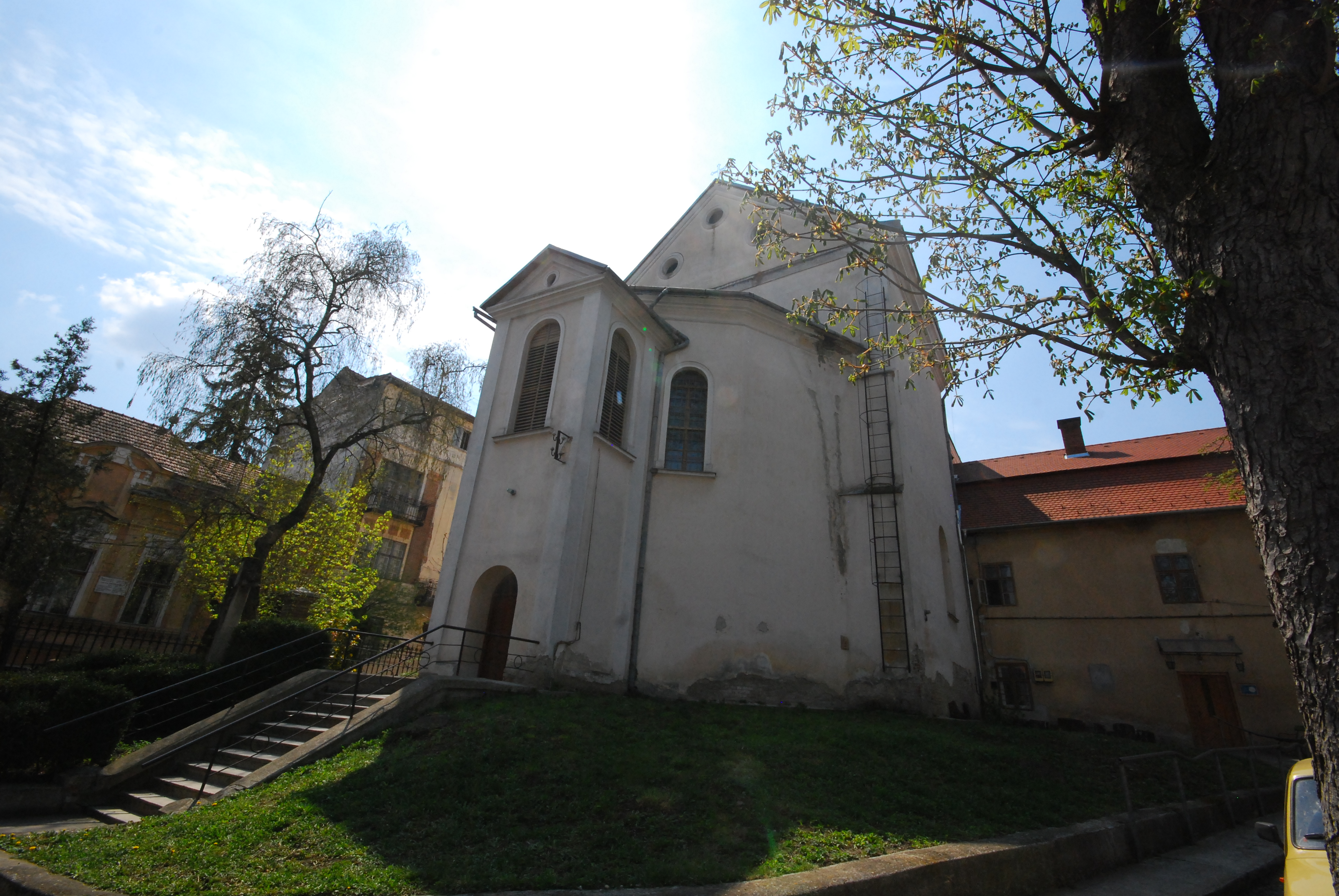 Mănăstirea minorită